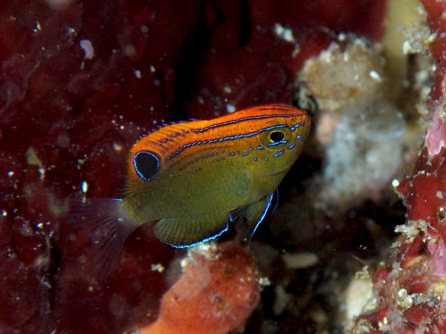 メガネスズメダイ Pomacentrus bankanensis